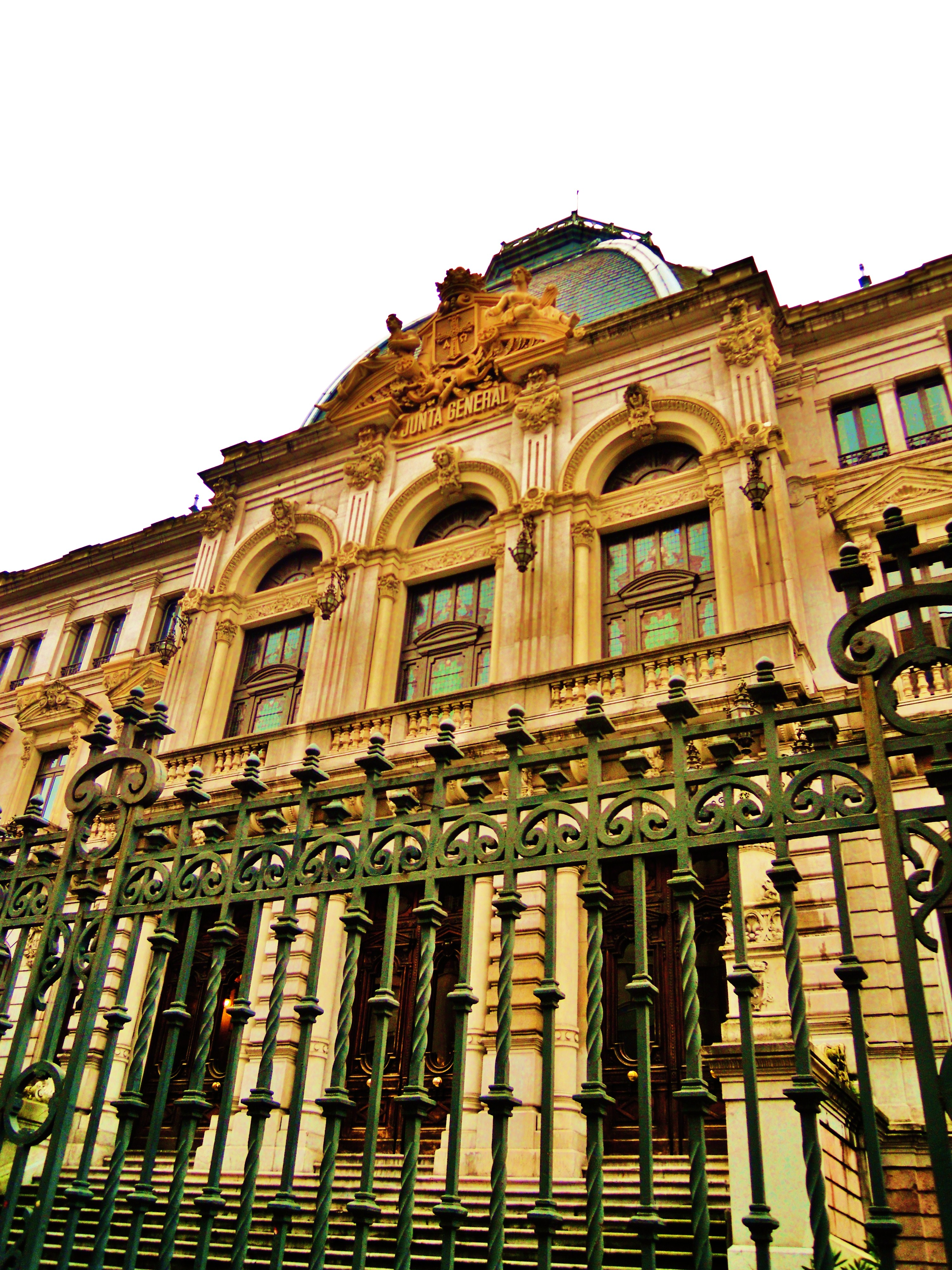 Xunta Xeneral d'Asturies